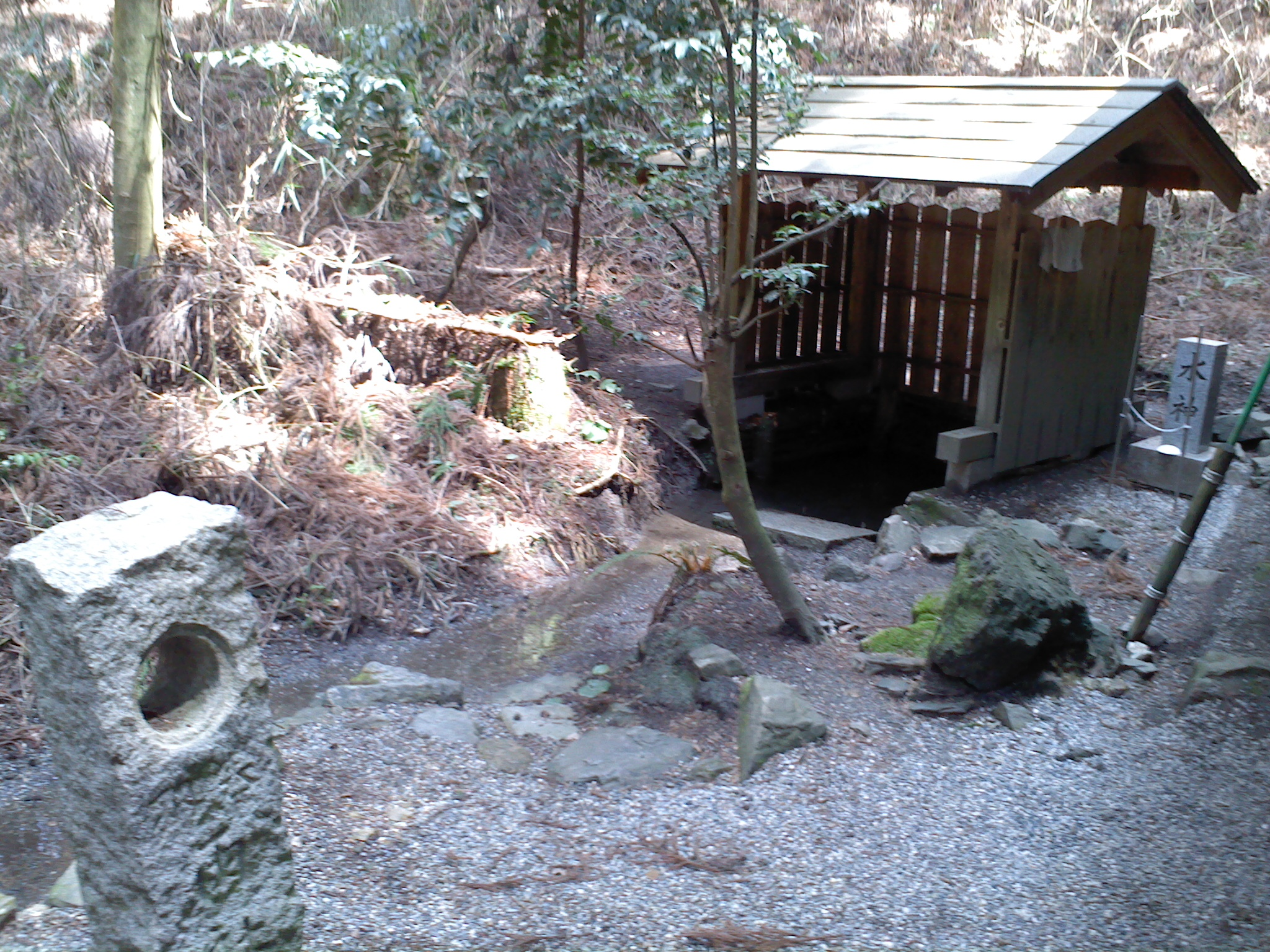 如意ヶ嶽・雨神社。